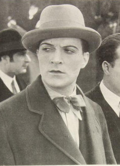 photo from Italian magazine Kinema, 1930.